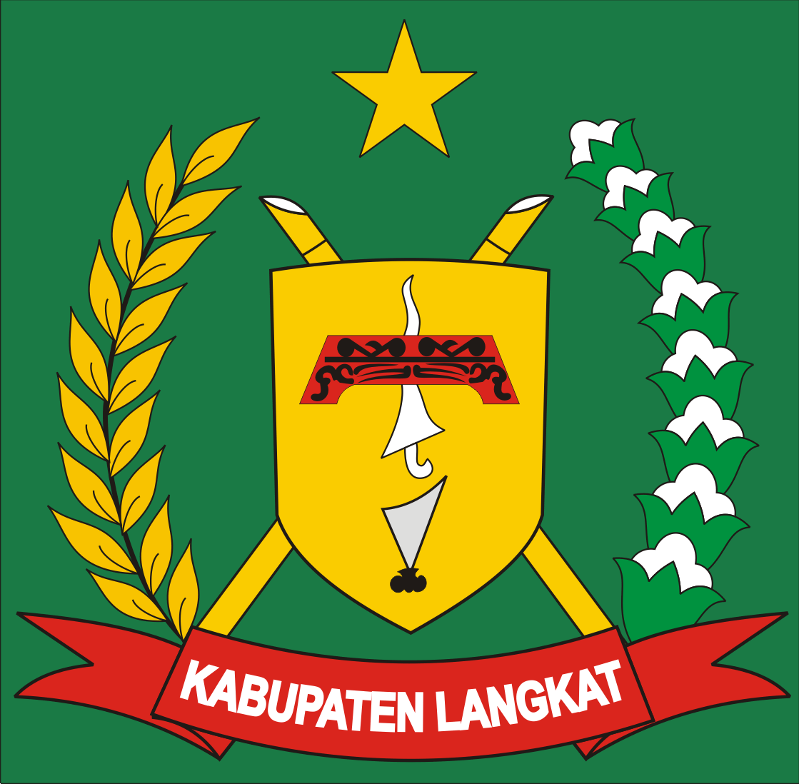 Langkat